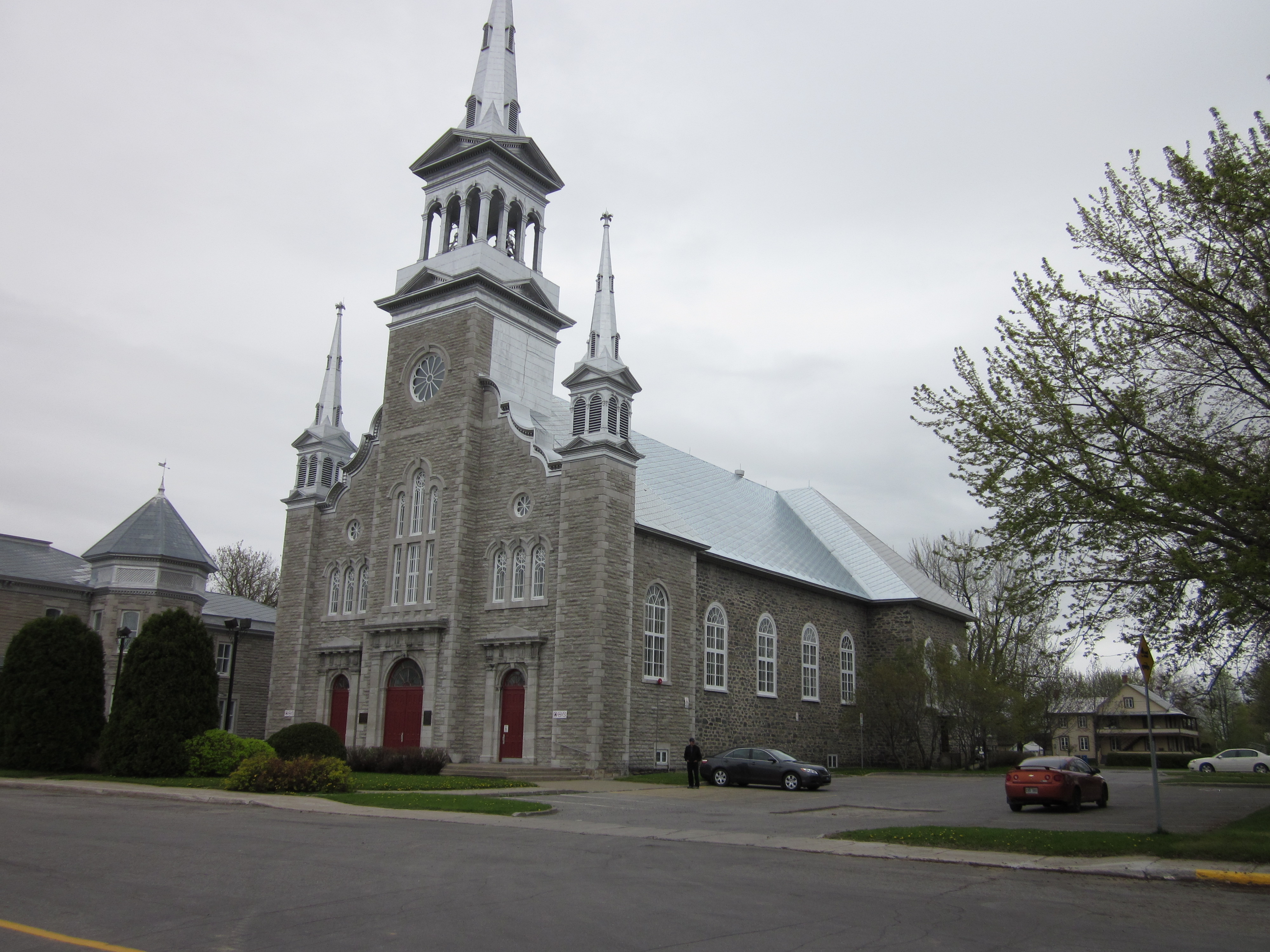 Église Saint-Édouard-de-Gentilly, classé monument historique en 1962